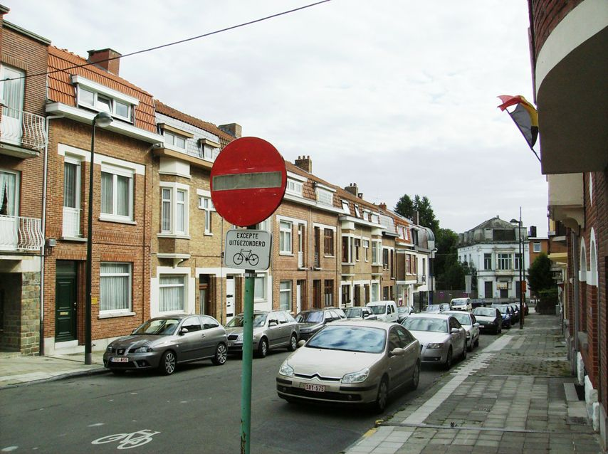 Av Geyskens Auderghem Belgium part 1